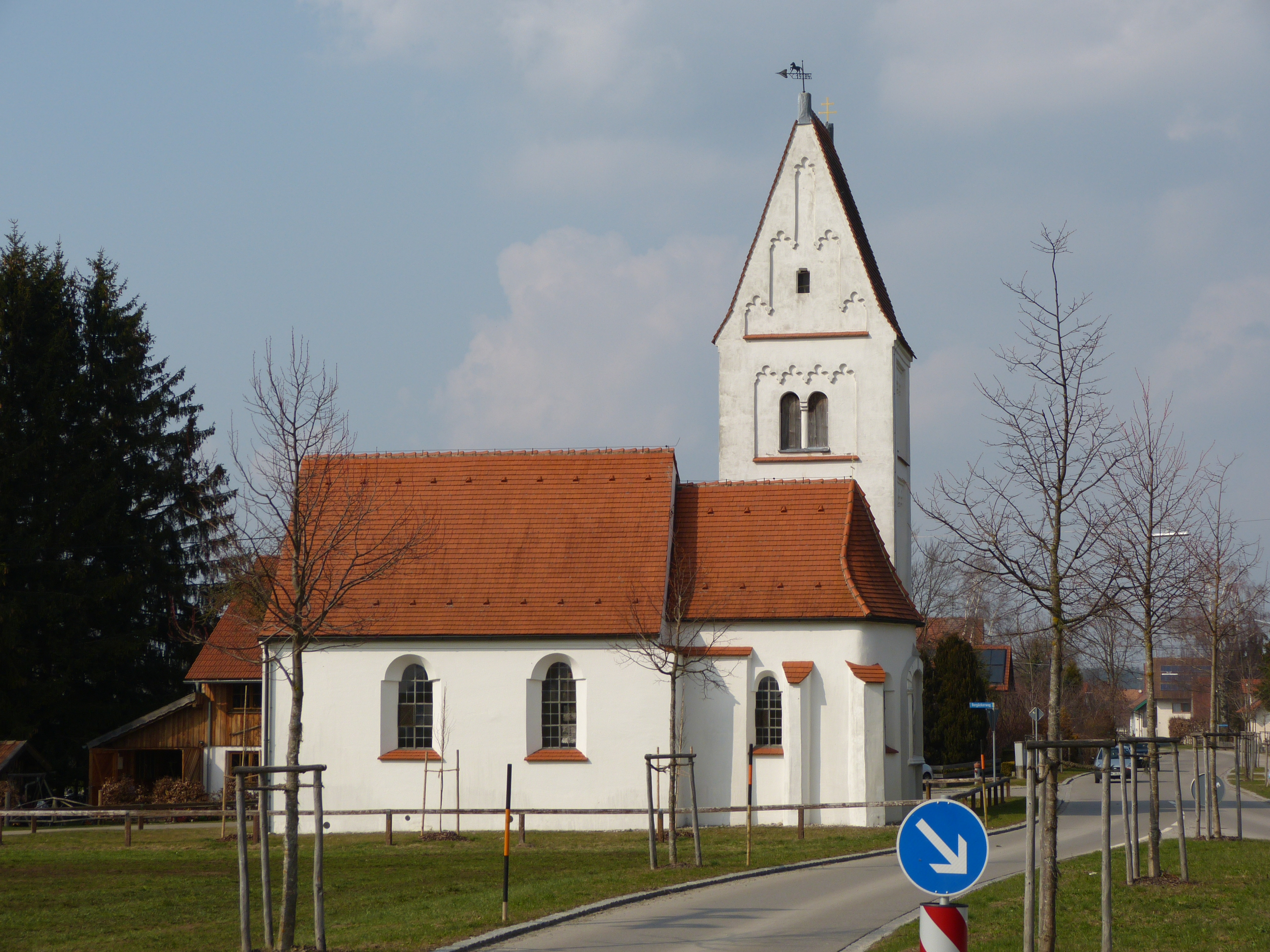 St. Leonhard, Gottenau, Gemeinde Markt Rettenbach, Landkreis Unterallgäu, Bayern